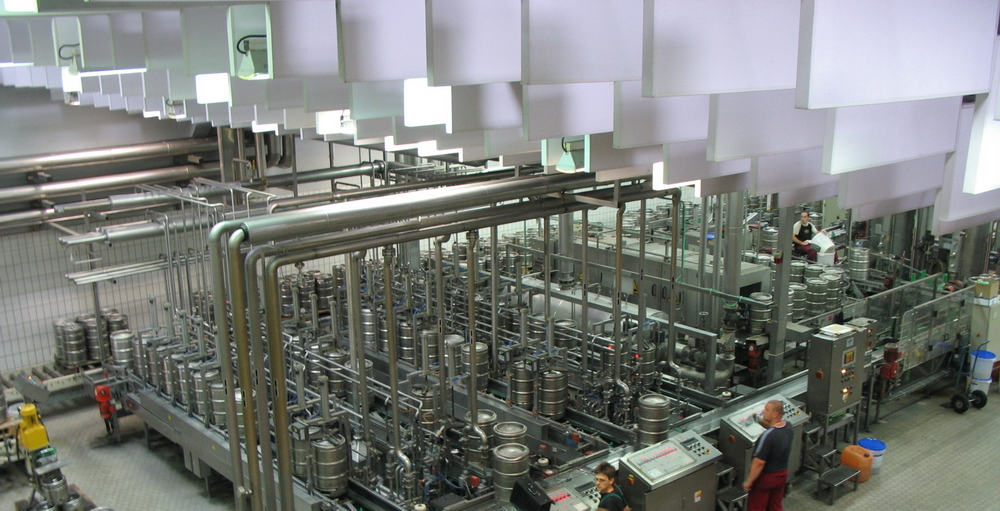 Into Královský pivovar Krušovice a.s.